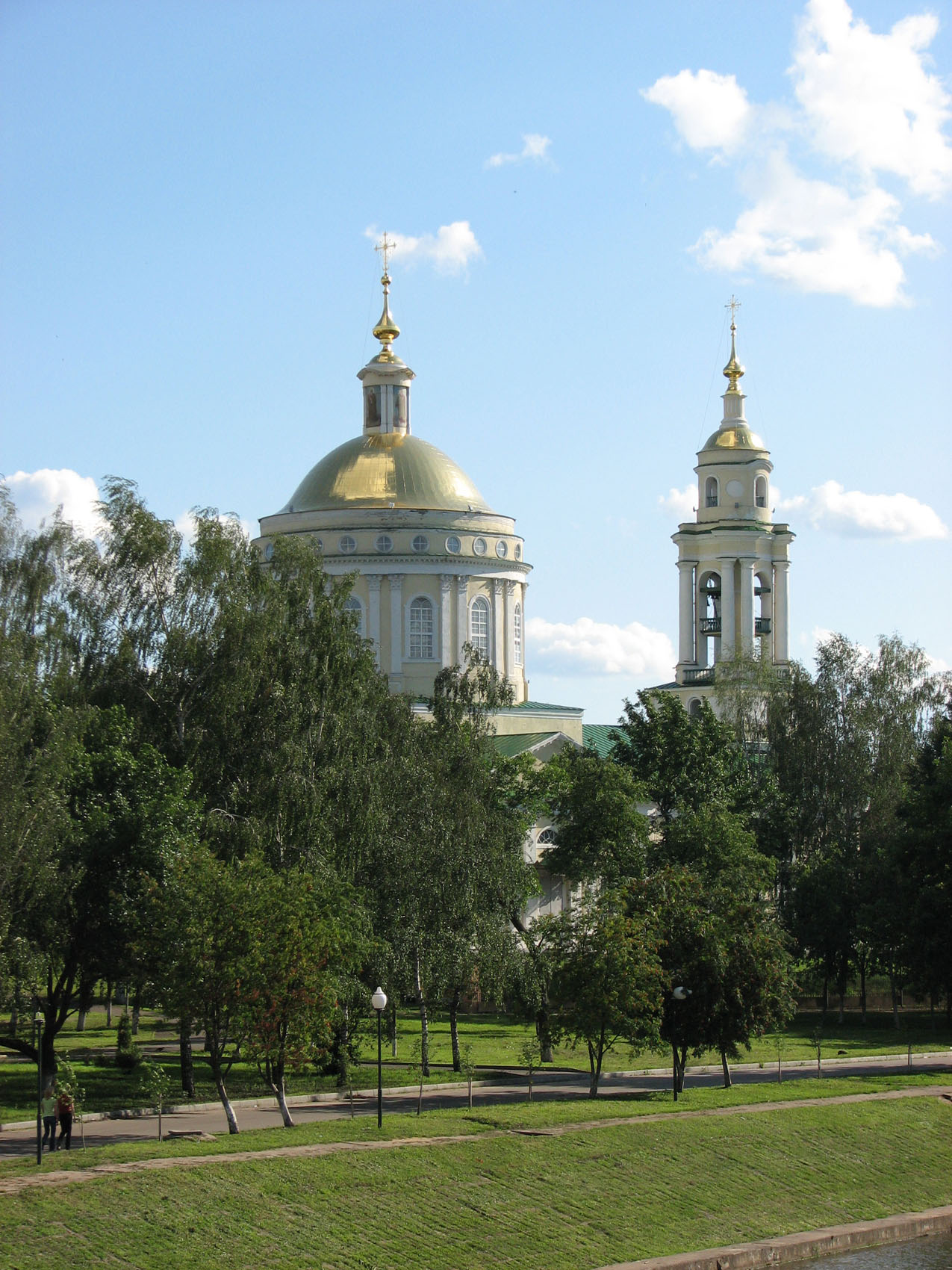 г. Орёл